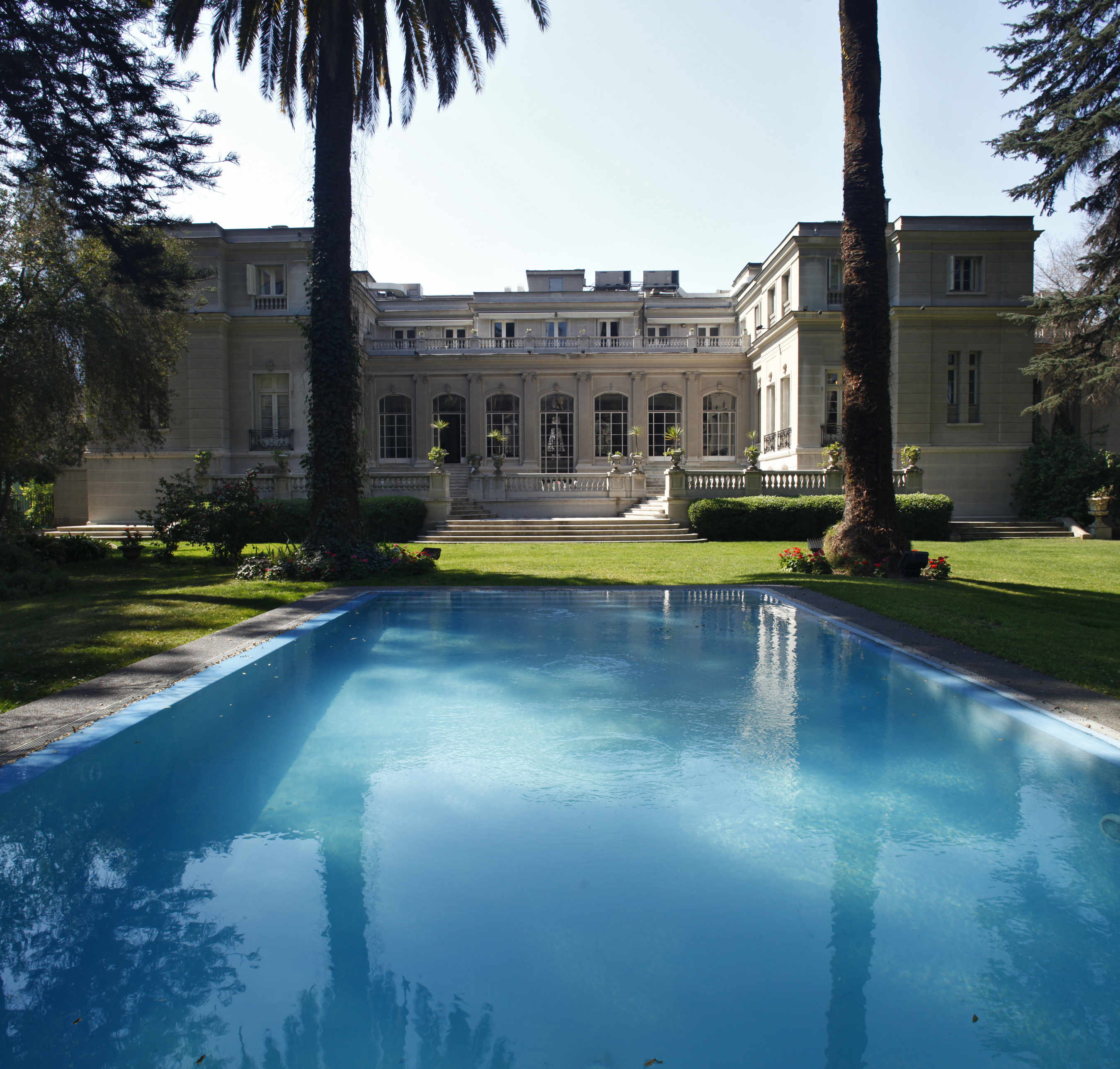 Sede de la Embajada de Argentina en Chile This is a photo of a national monument in Chile: 573